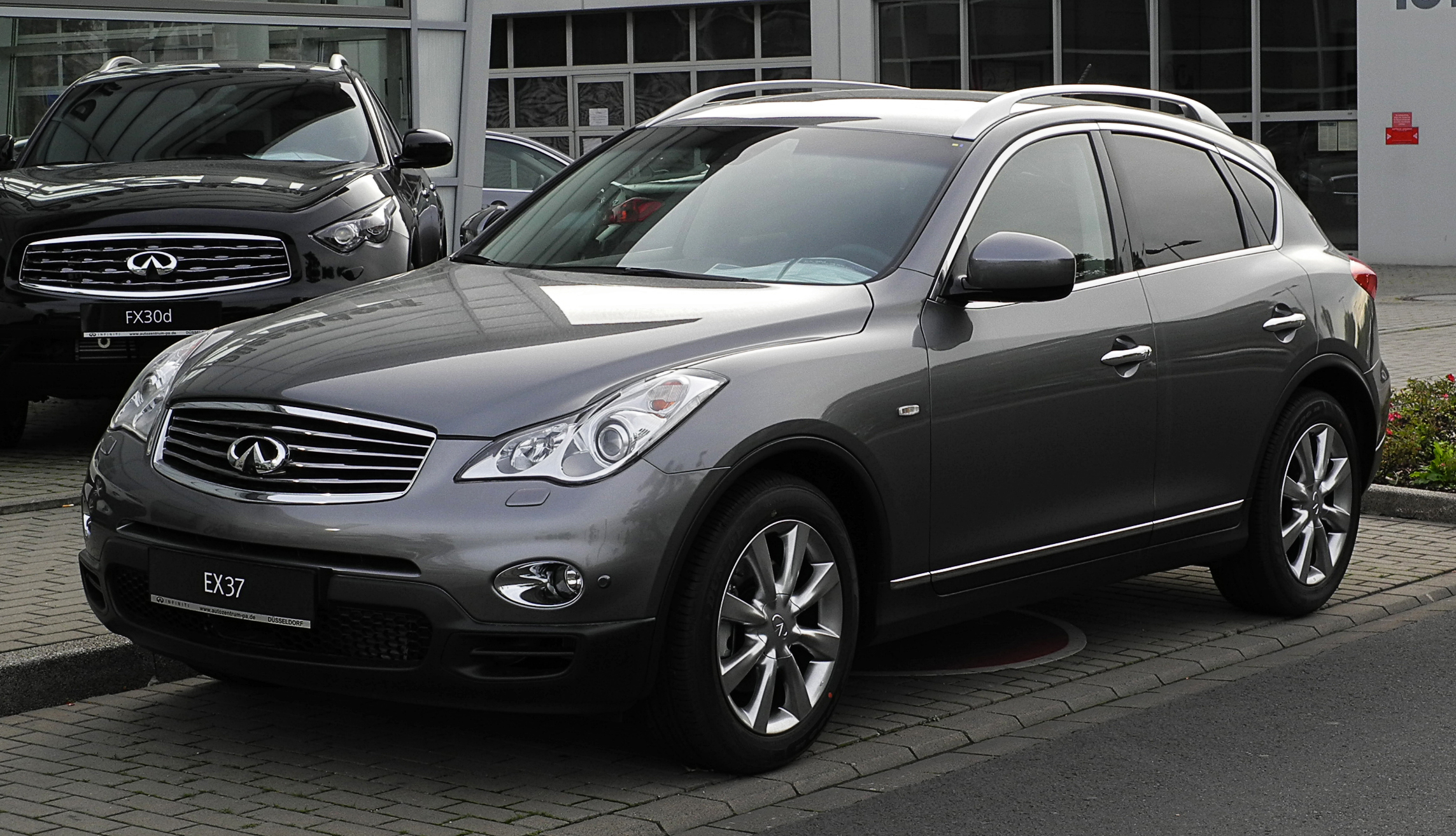 Infiniti FX30d GT Premium (J50)